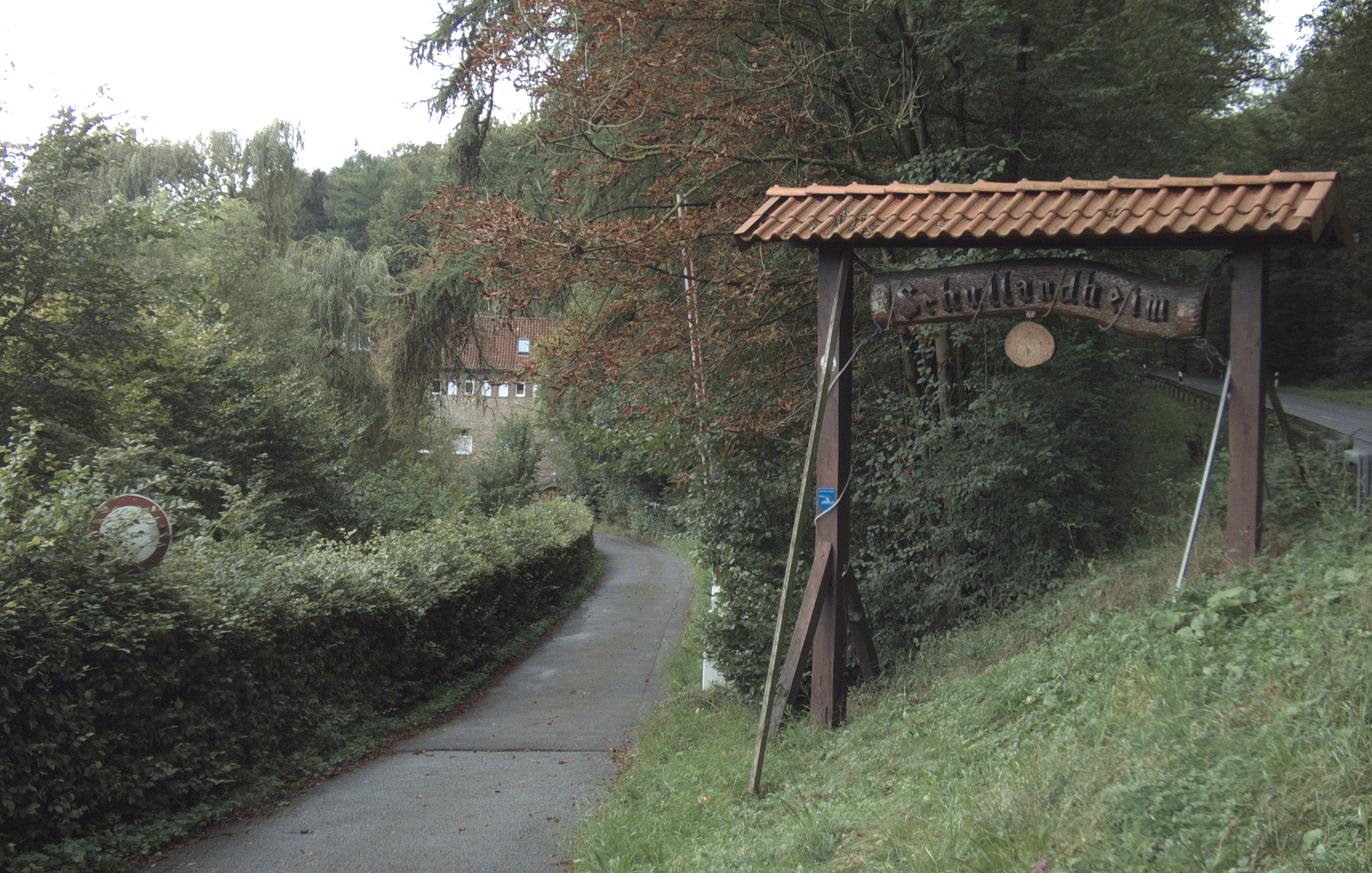 Einfahrt des Schullandheims Nienstedt der Leibnizschule Hannover im Stadtteil Nienstedt der Stadt Bad Münder am Deister in Niedersachsen